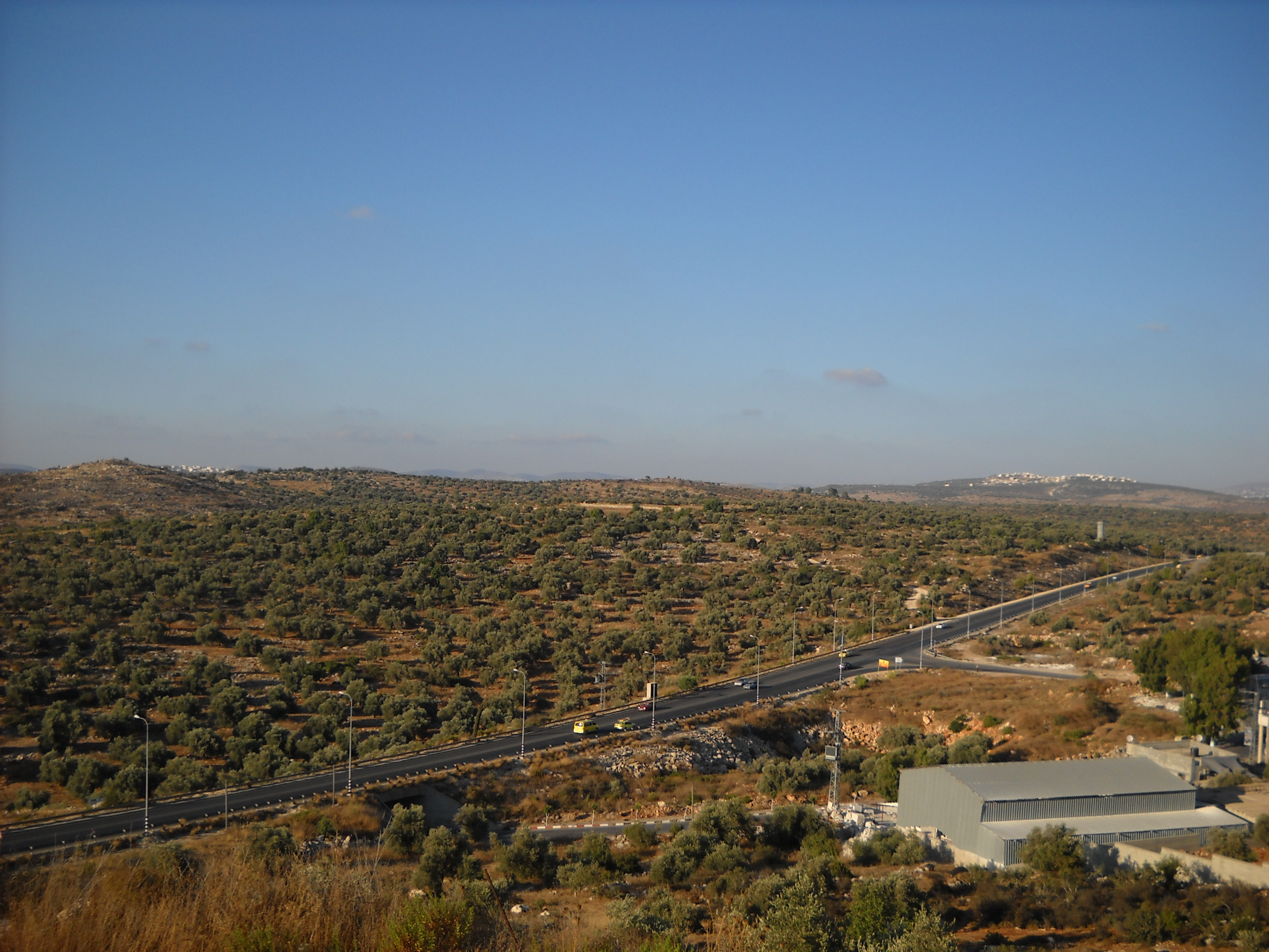 כביש 55, צומת הכניסה לעזון.